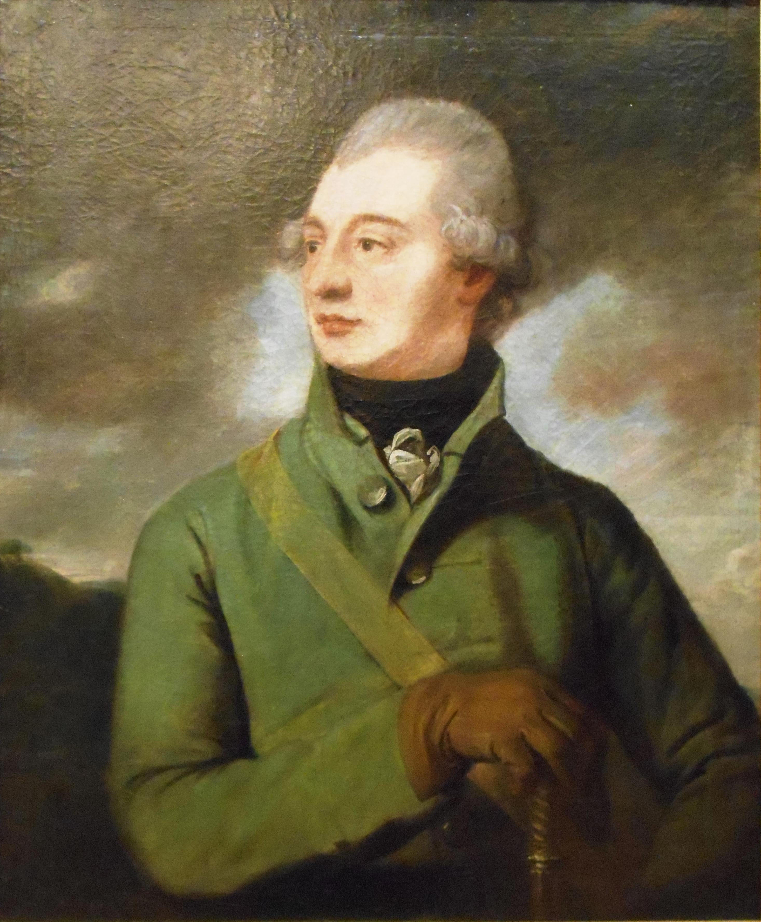 Charles-Louis Tarieu, chevalier de La Naudière (1743-1811), huile sur toile